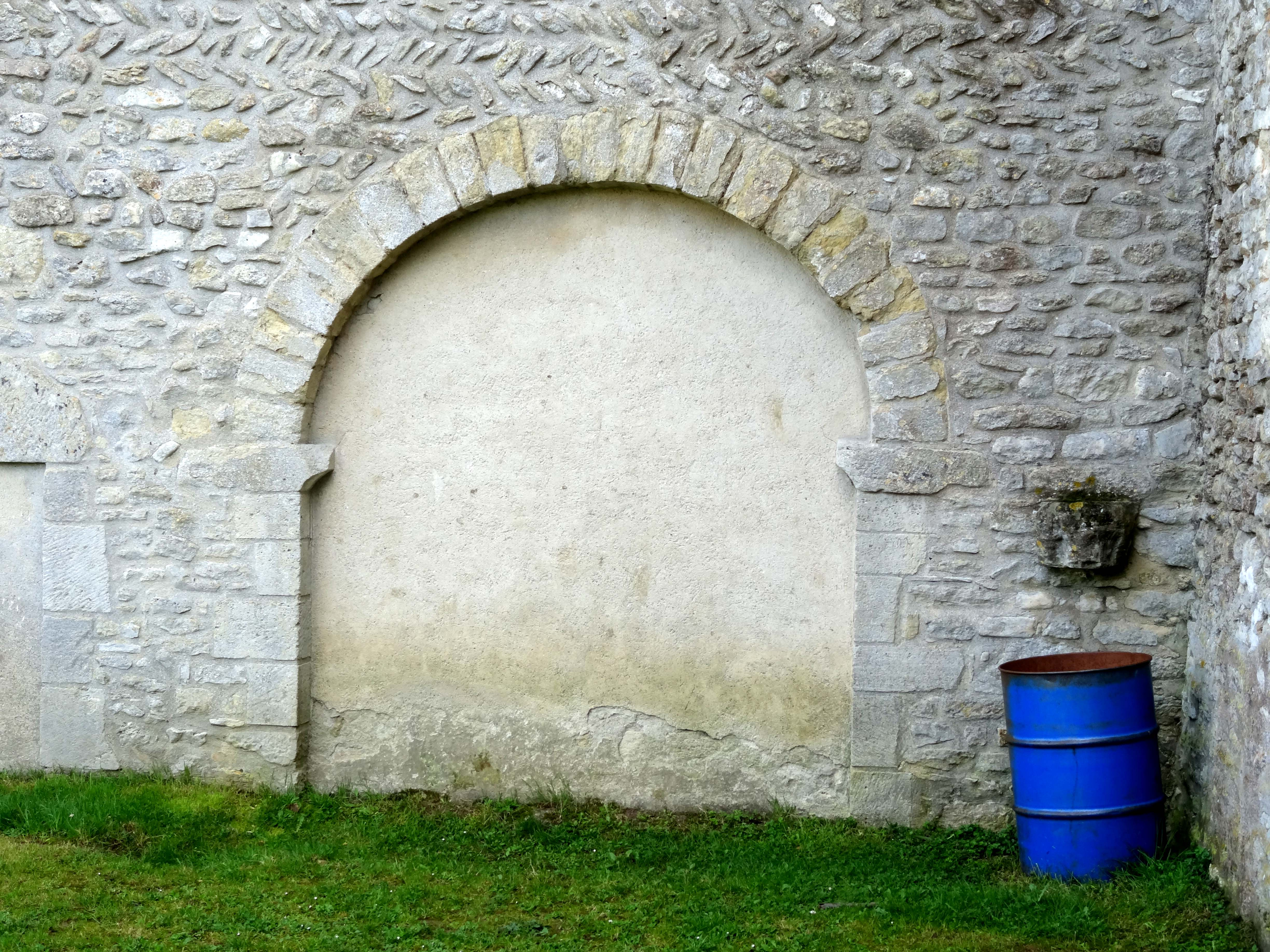 Église Saint-Martin de Follainville - voir titre.